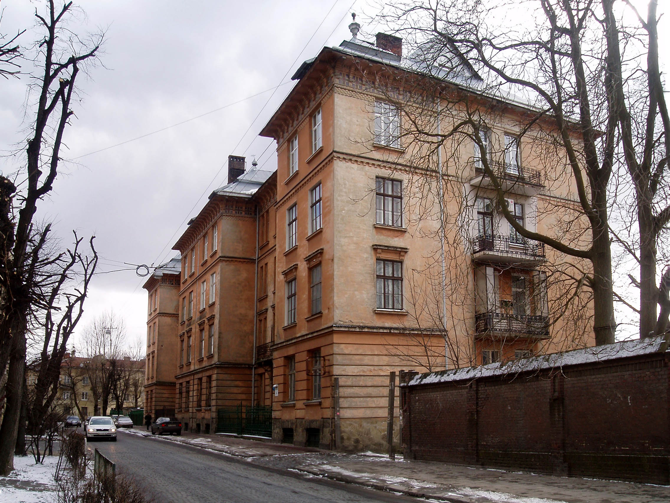 Колишня бурса інститутуту «Народний дім» на вулиці Лисенка 14 у Львові. Архітектор Олександр Лушпинський.